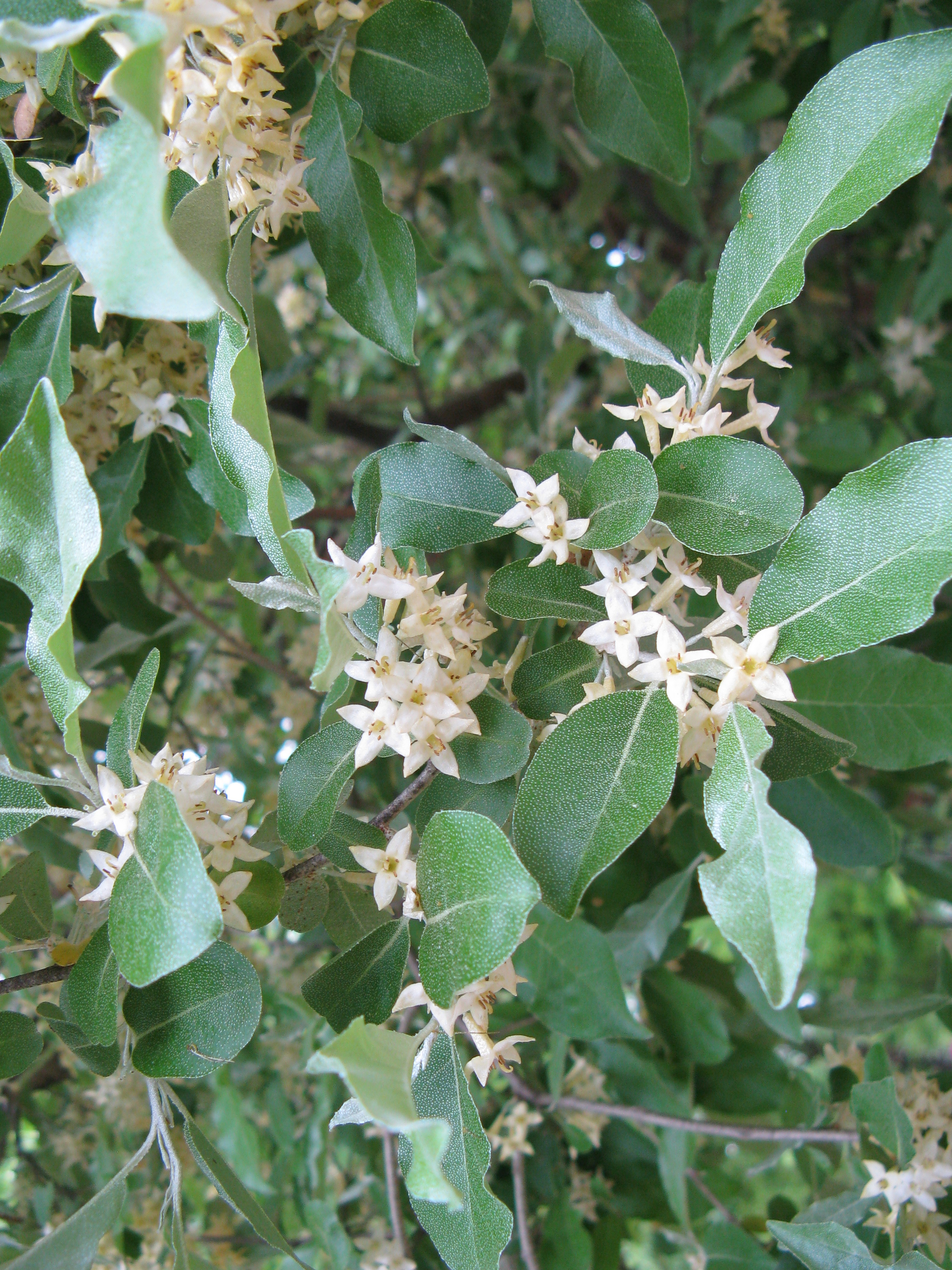 Elaeagnus umbellata